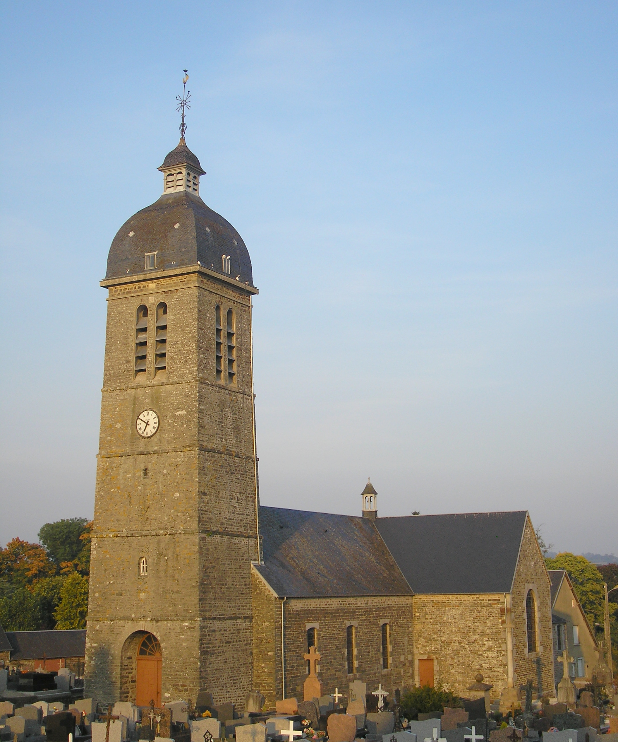 Le Tourneur (Normandie, France). L'église Saint-Martin.